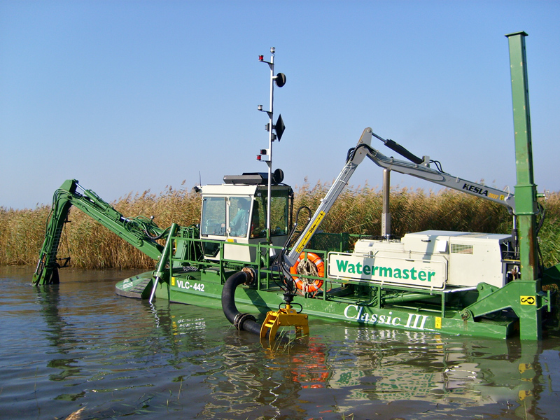 Watermaster imuruoppaaja